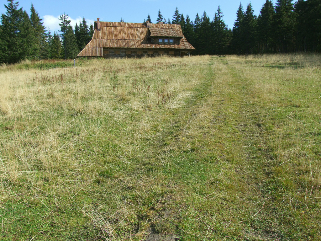 Turbacz (Gorce)